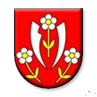 erb